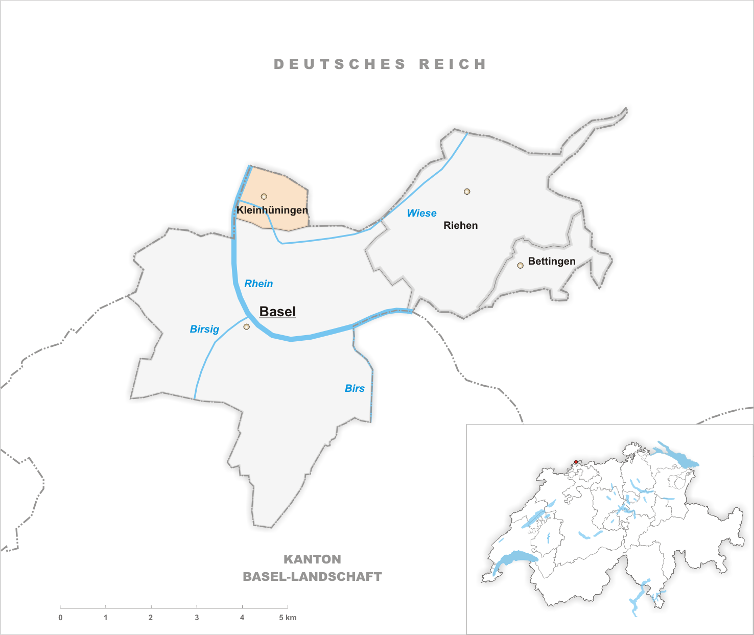 Municipality of Kleinhüningen Artist: Tschubby